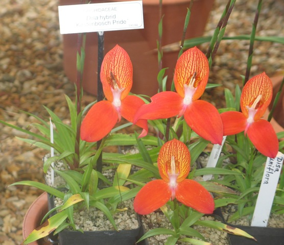 Disa uniflora. Kirstenbosch Gardens Cape Town